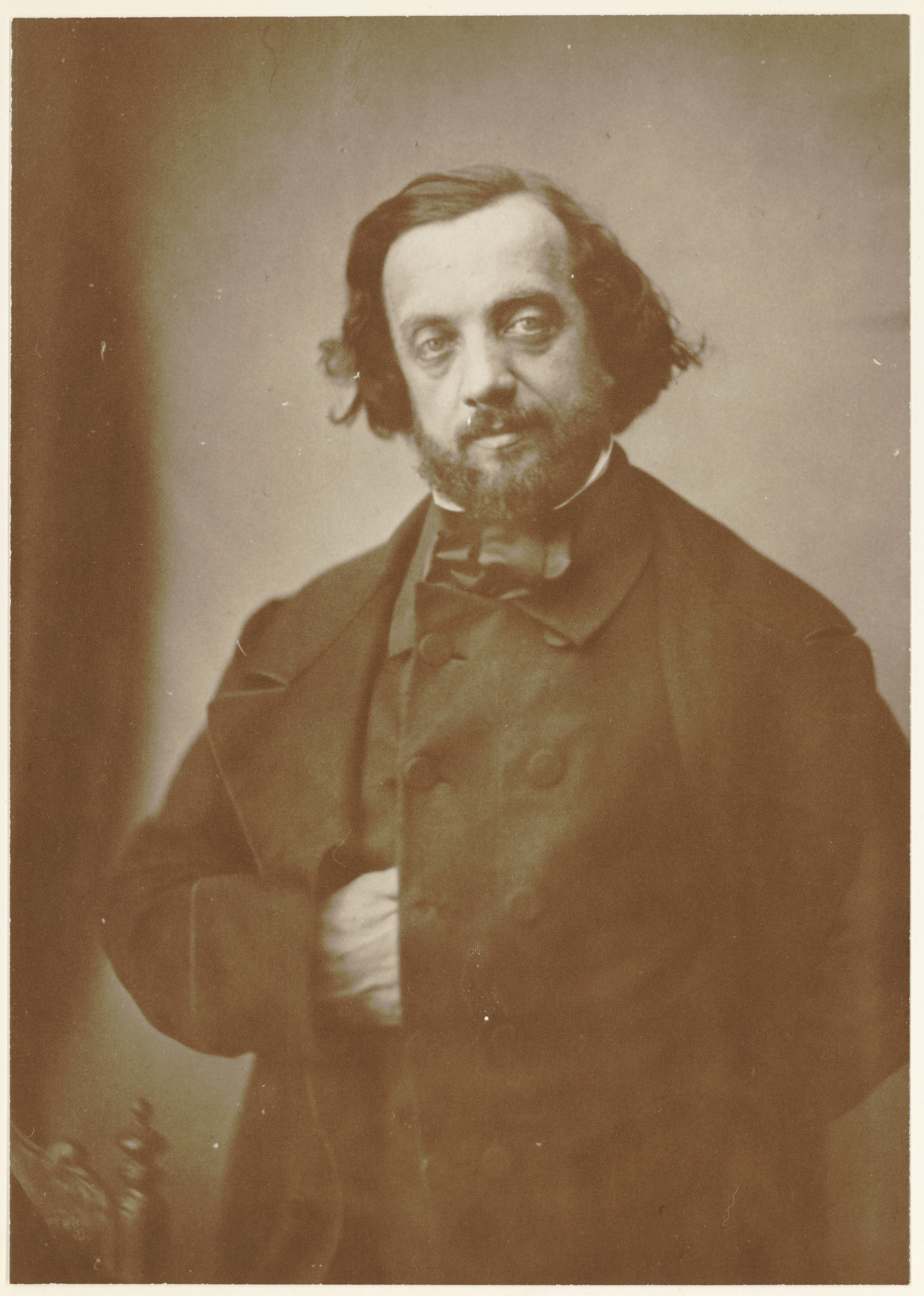 Portrait de Adolphe Appian